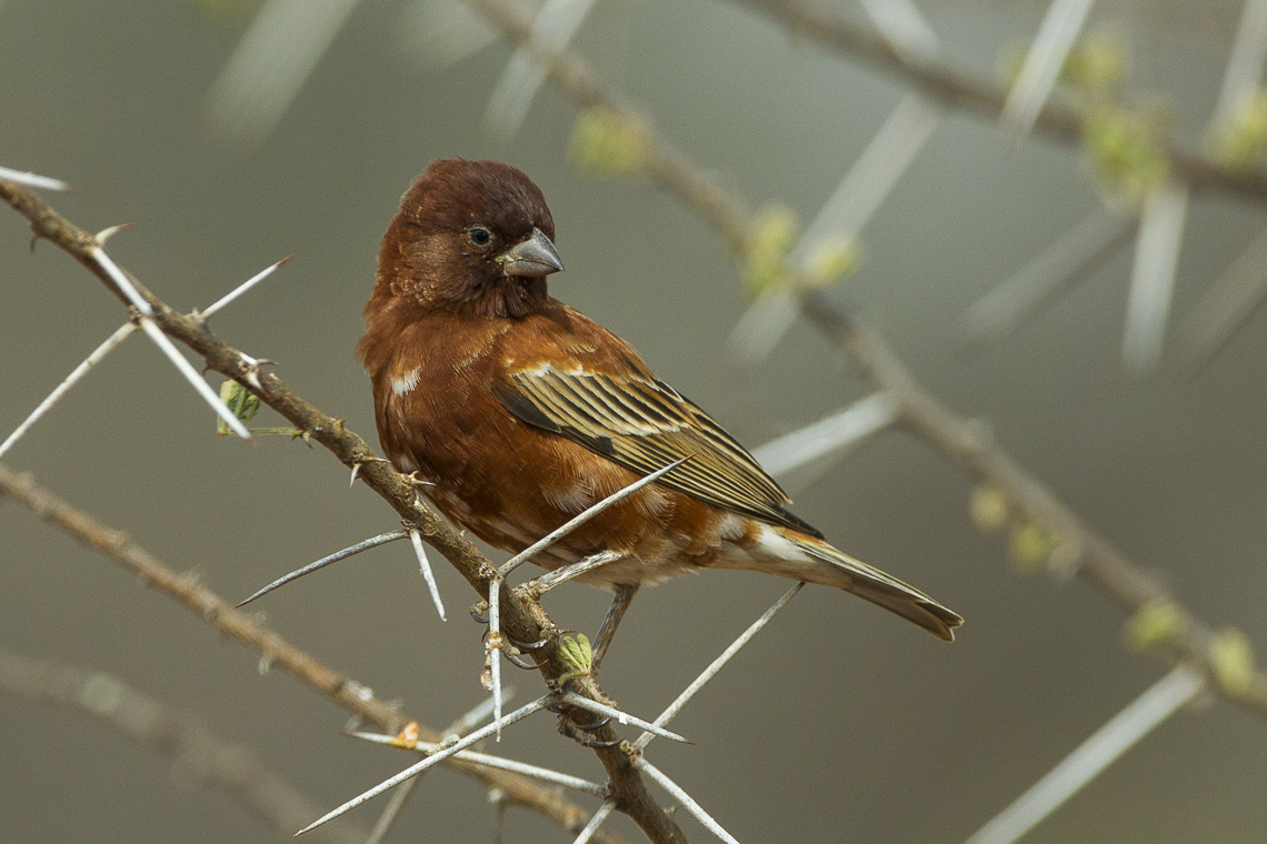 Chestnut Sparrow - Samburu - Kenya_S4E5378